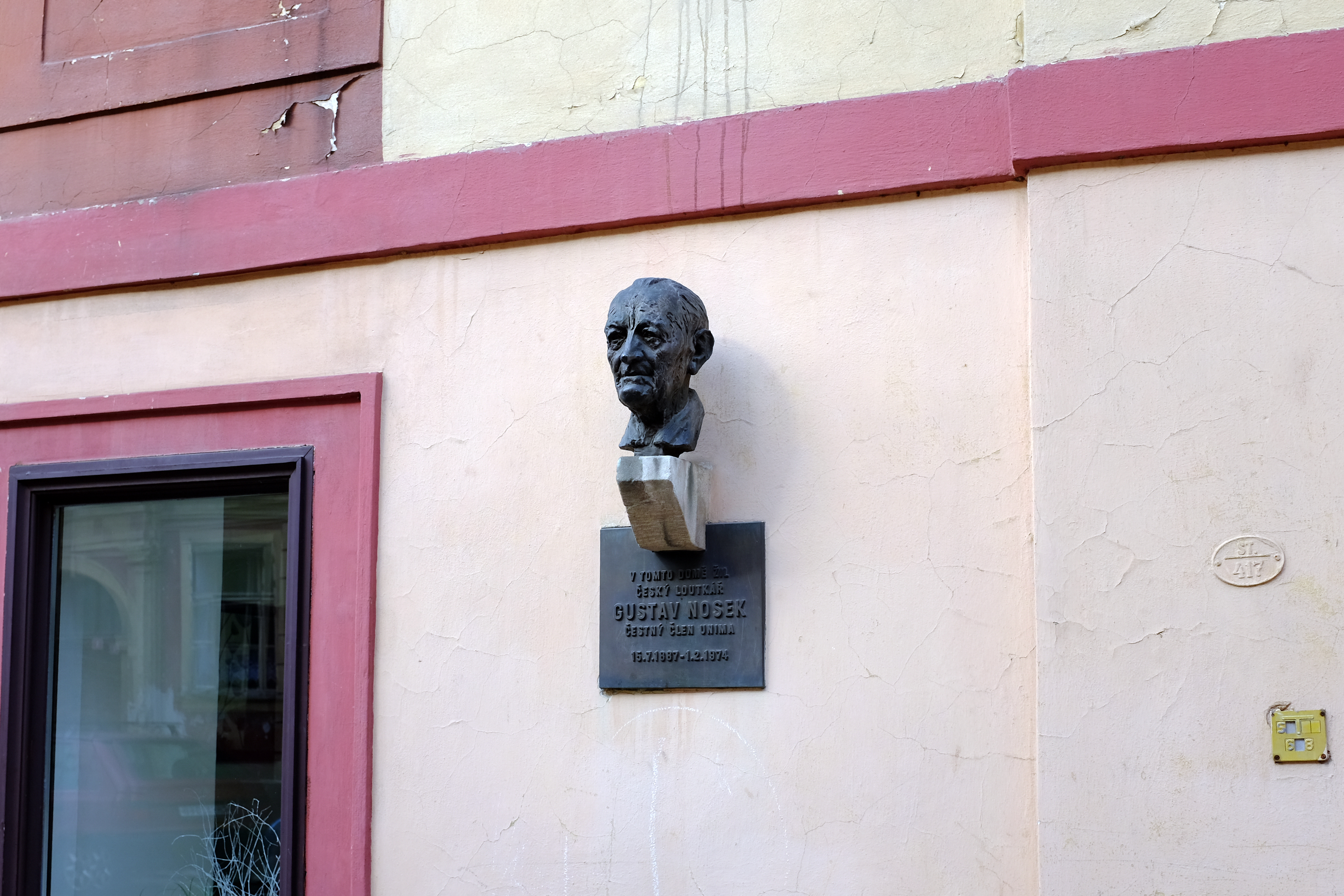 Cheb, pamětní deska a busta loutkáře Gustava Noska v Dlouhé ulici